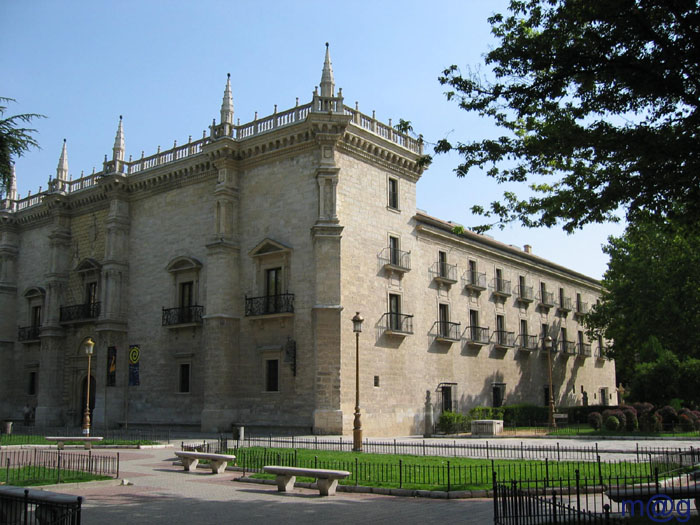 Valladolid – España (Spain) - Palacio de Santa Cruz: Comenzó su construcción en el año 1486. En 1490 se hace cargo de las obras Lorenzo Vázquez de Segovia. Fue inaugurado en 1491.